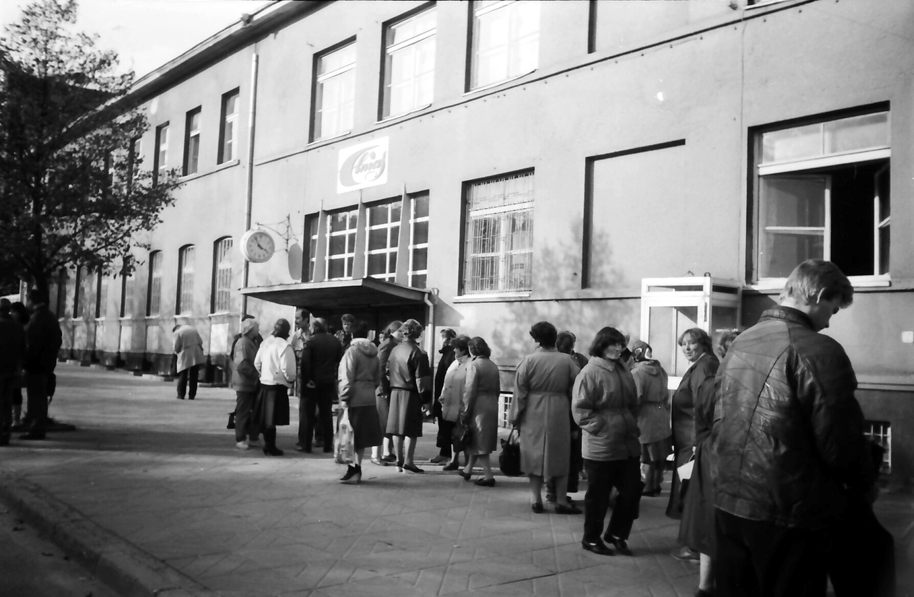 Elnio bankrotas 1996 m. spalio mėn.